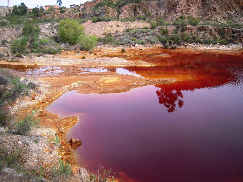 Lagoa vermelha na Mina do Lousal, Grândola, Portugal.